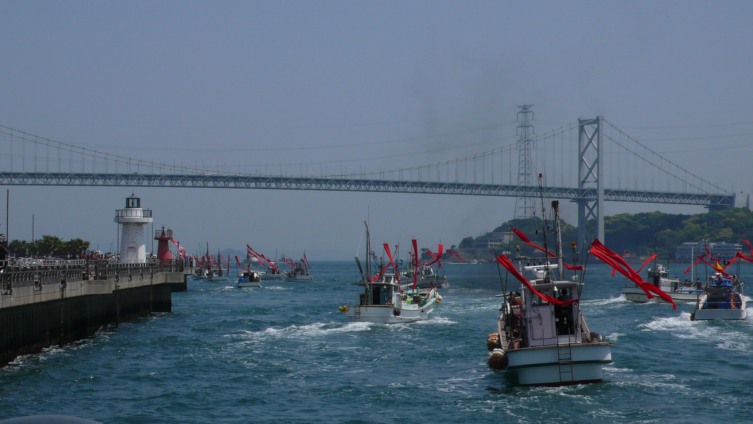 「しものせき海峡まつり」での「源平船合戦海上パレード」(2008年5月3日、山口県 下関市)